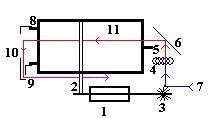 סכמה של מייבש כביסה. סירטוט עצמי